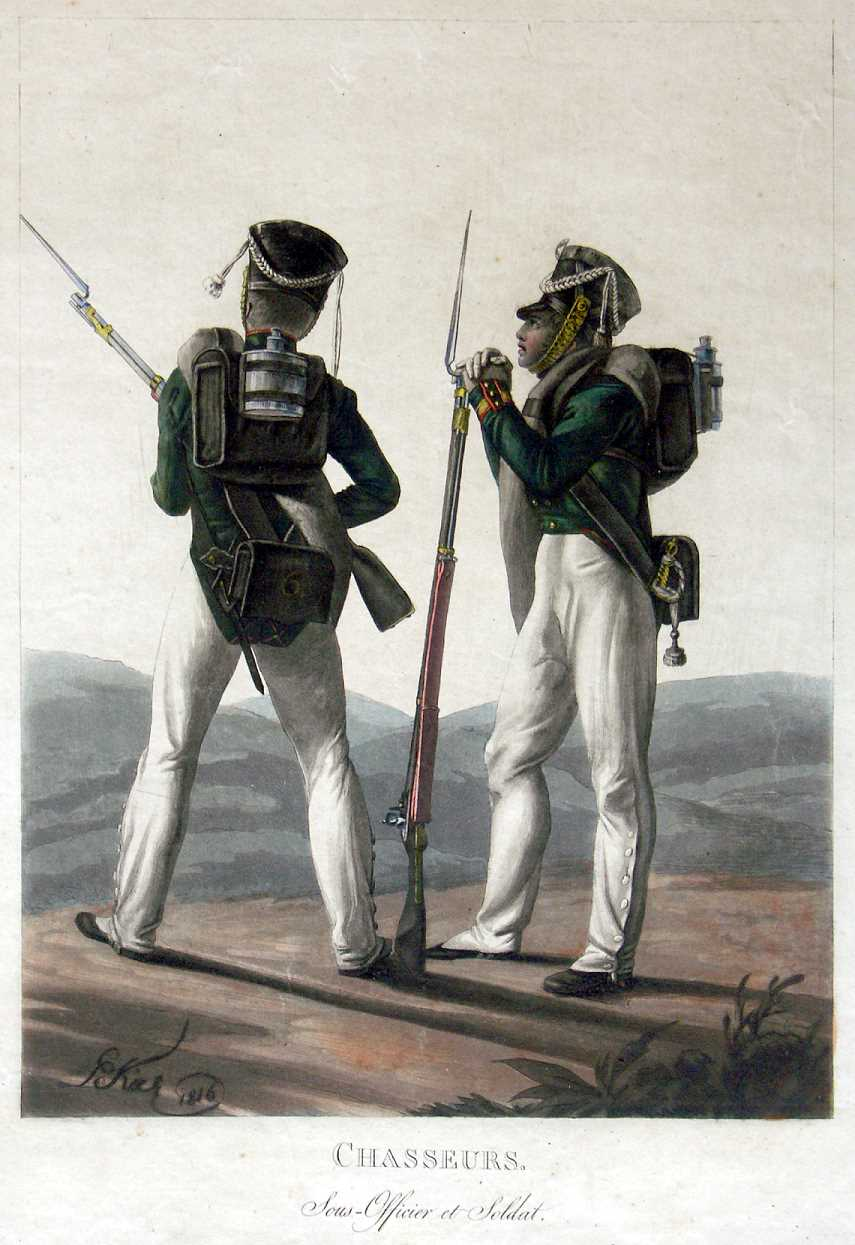 Нижние чины Егерских полков